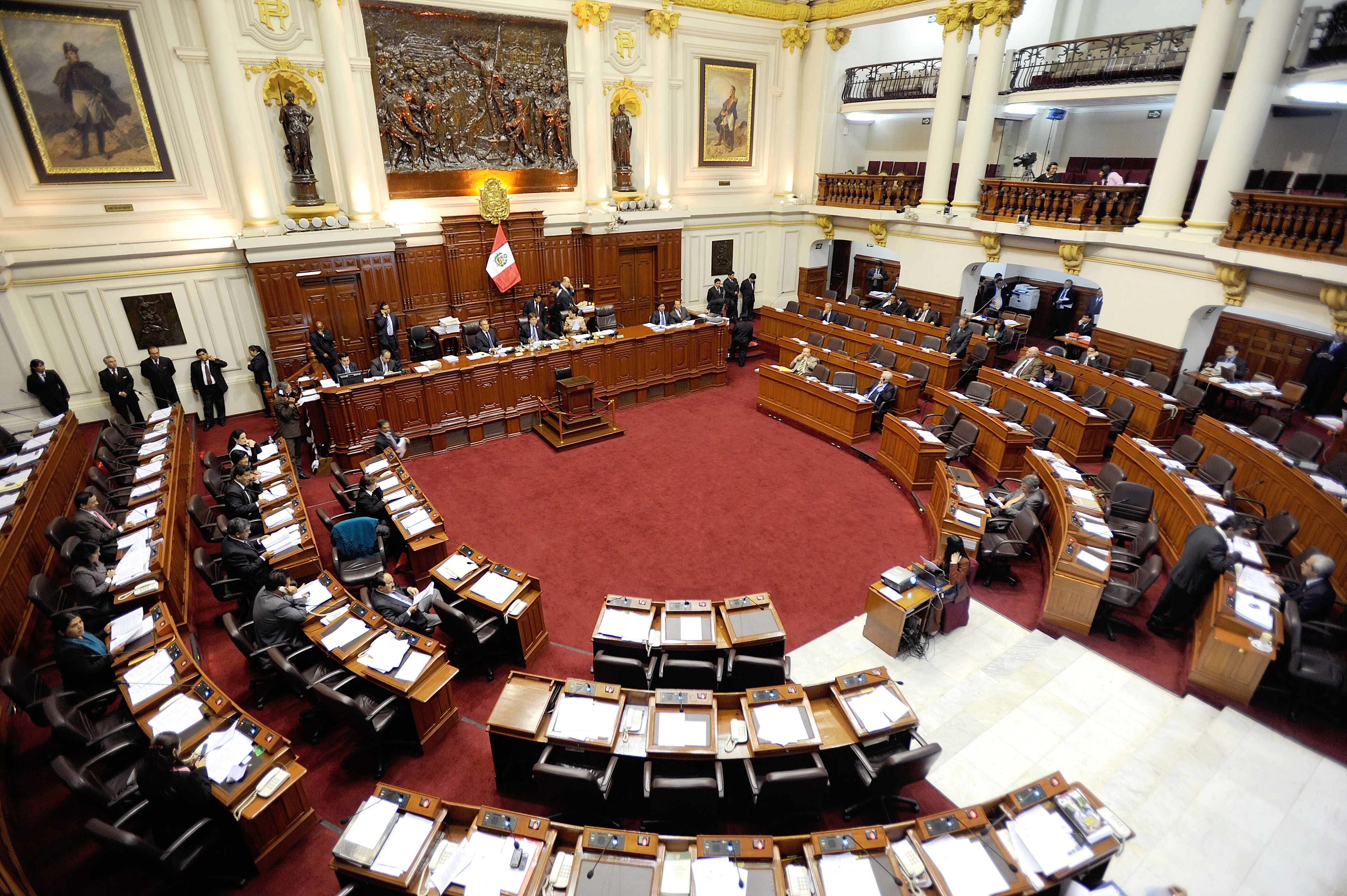 A las 10 y 3 minutos de esta mañana fue reiniciada la sesión del Pleno del Congreso, en la cual proseguirá tratándose temas debidamente priorizados antes por la Junta de Portavoces. La sesión comenzó con la asistencia de 55 parlamentarios. El quórum para realizarla es de 51 legisladores presentes.